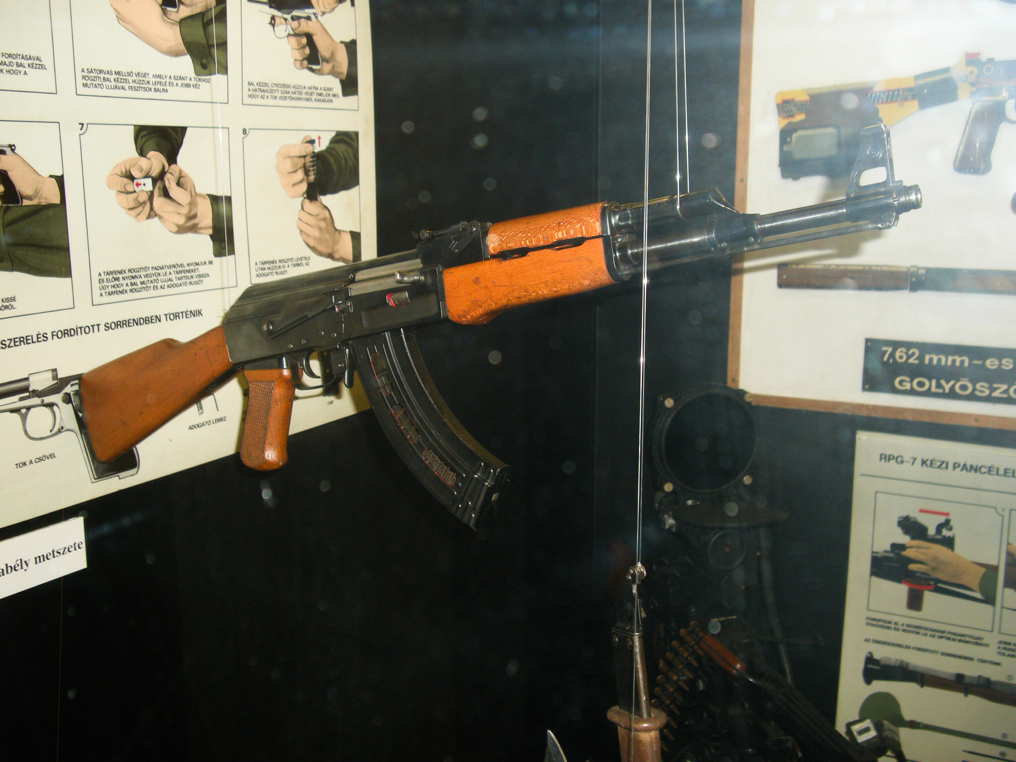 Budapest 2012